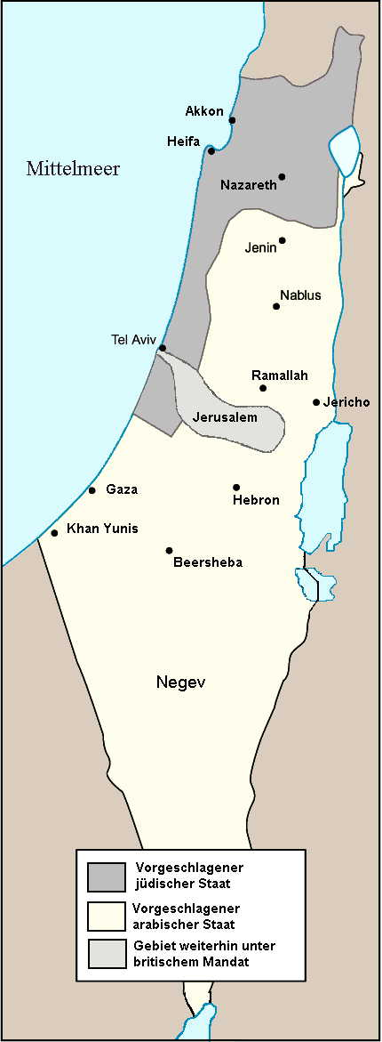 Vorschlagskarte Peel Kommission